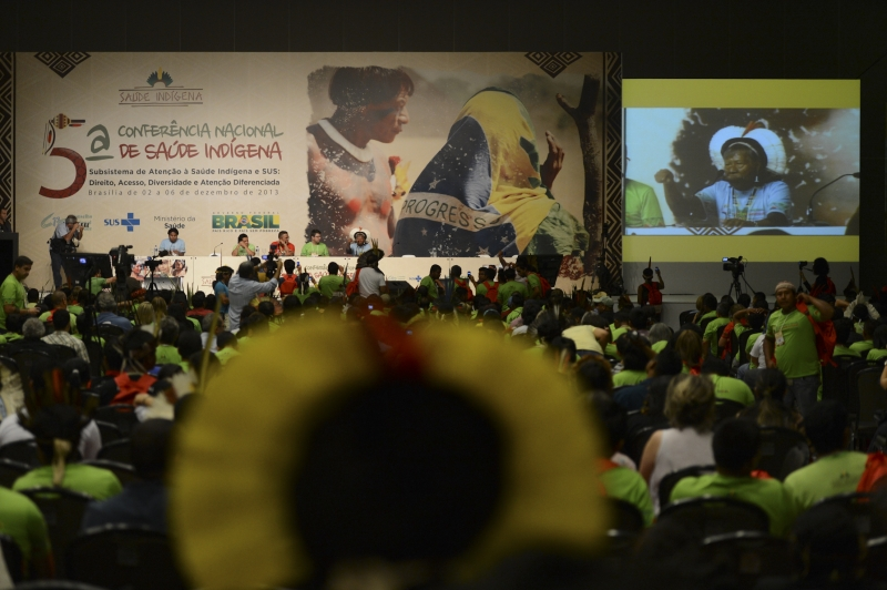 Brasília - O ministro da Saúde, Alexandre Padilha, durante abertura da 5a Conferência Nacional de Saúde Indígena (5a CNSI), realizada pelo Ministério da Saúde e o Conselho Nacional de Saúde (CNS)